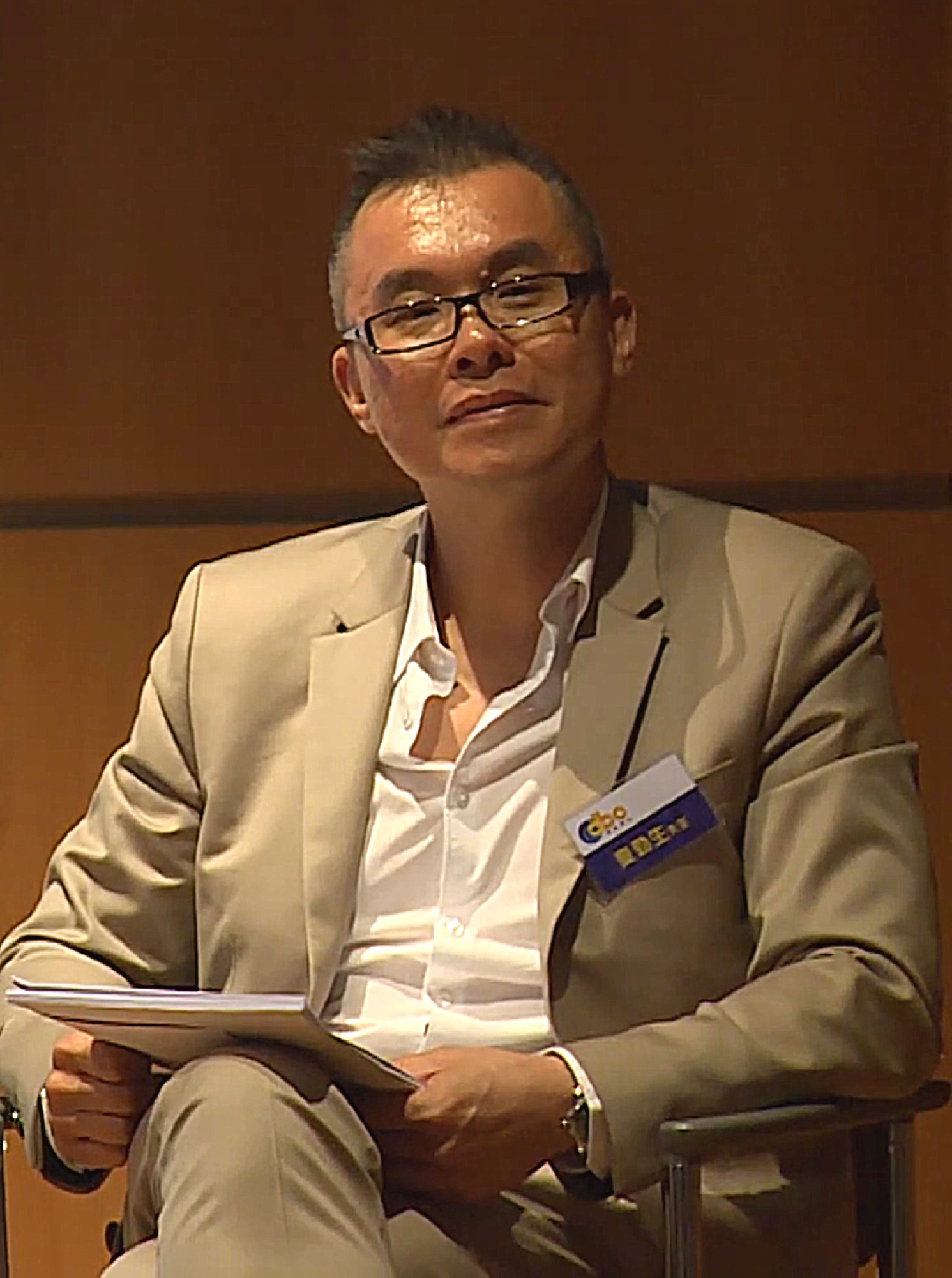 中文（香港）: 香港著名歷史學家，研究範疇為近代中國軍事、外交史及史學史。